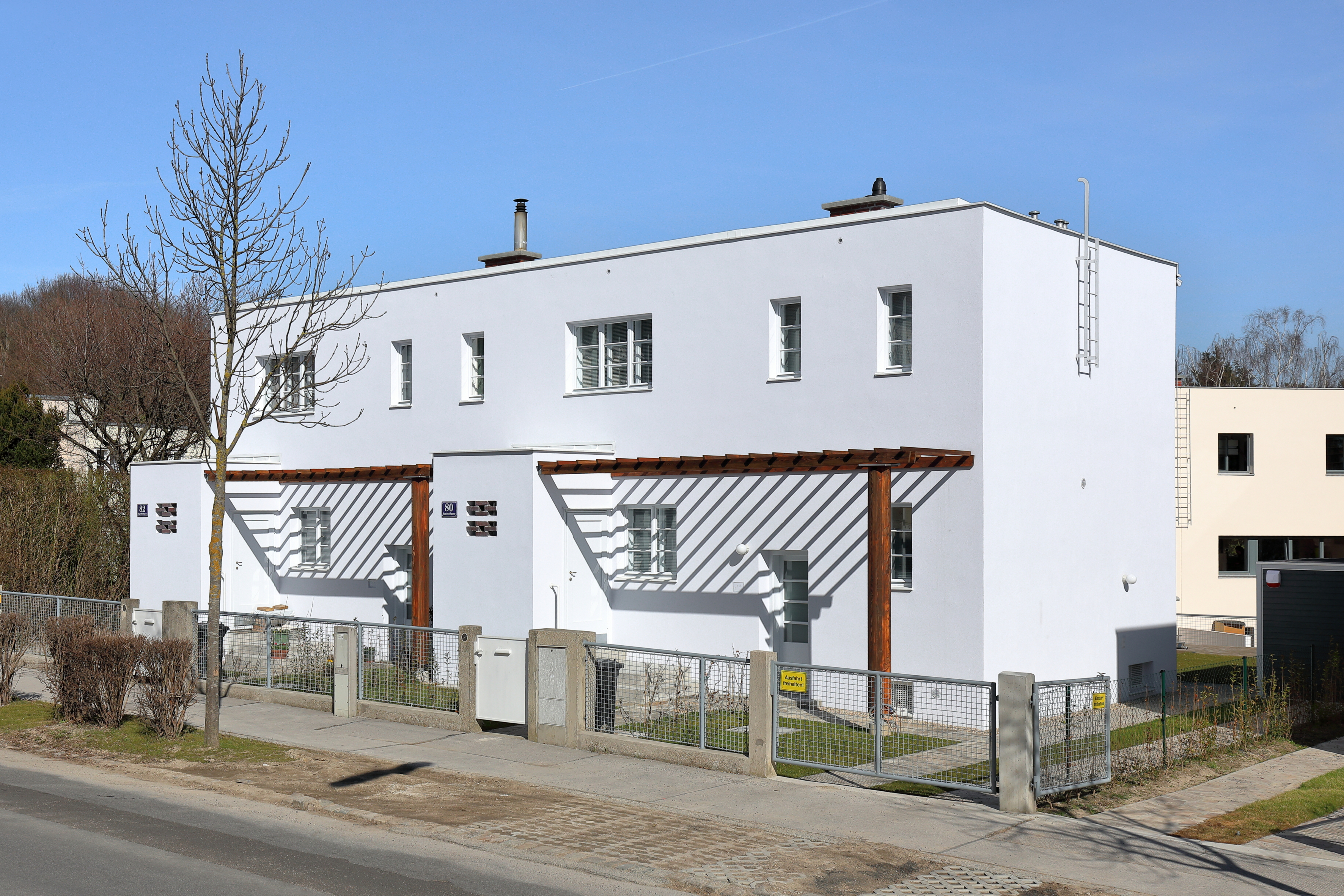 Das Doppelhaus Jagdschloßgasse 80, 82 der Werkbundsiedlung Wien im 13. Wiener Gemeindebezirk Hietzing.Errichtet wurden das Doppelhaus um 1930 nach Plänen des Architekten Arthur Grünberger. Es ist ein Teil einer Mustersiedlung von etwa 70 Häusern mit rund 50 verschiedenen Haustypen, die von 1929 bis 1932 gebaut wurden. An der Planung der einzelnen Häuser beteiligten sich über 30 Architekten. This media shows the Vienna residential building (Gemeindebau) with the ID 61.